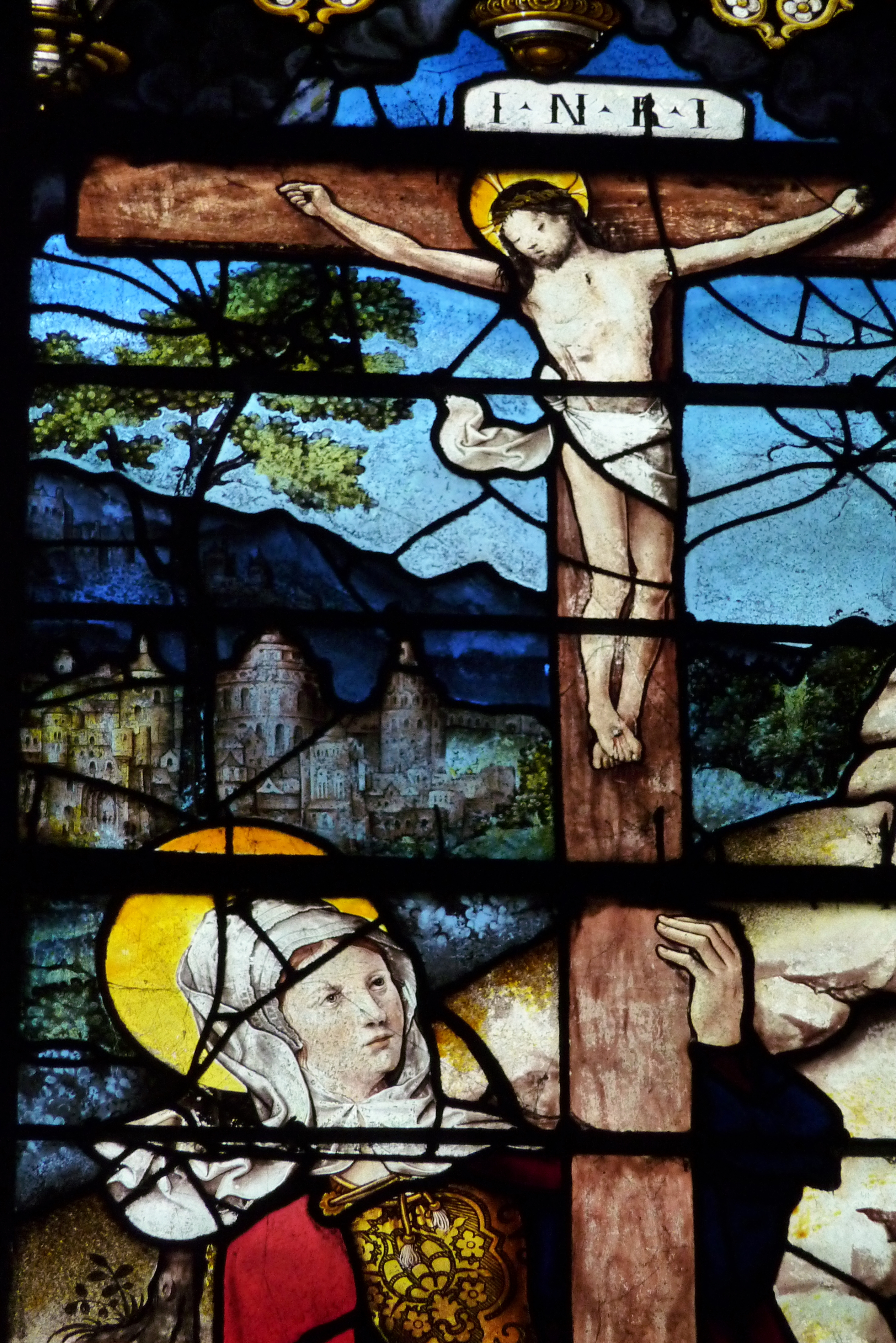 Ausschnitt des Bleiglasfensters Nr. 5 (16. Jahrhundert) in der katholischen Pfarrkirche Saint-Martin (Collégiale Saint-Martin) in Montmorency, Darstellung: hl. Maria-Magdalena am Kreuz Christi, Karton: Gauthier de Campes, Ausführung: Jean Chastelain (siehe: Dominique Foussard, Charles Huet, Mathieu Lours: Églises du Val-d'Oise. Pays de France, Vallée de Montmorency, Société d'Histoire et d'Archéologie de Gonesse et du Pays de France, 2. Auflage, Gonesse 2011, ISBN 9782953155426)